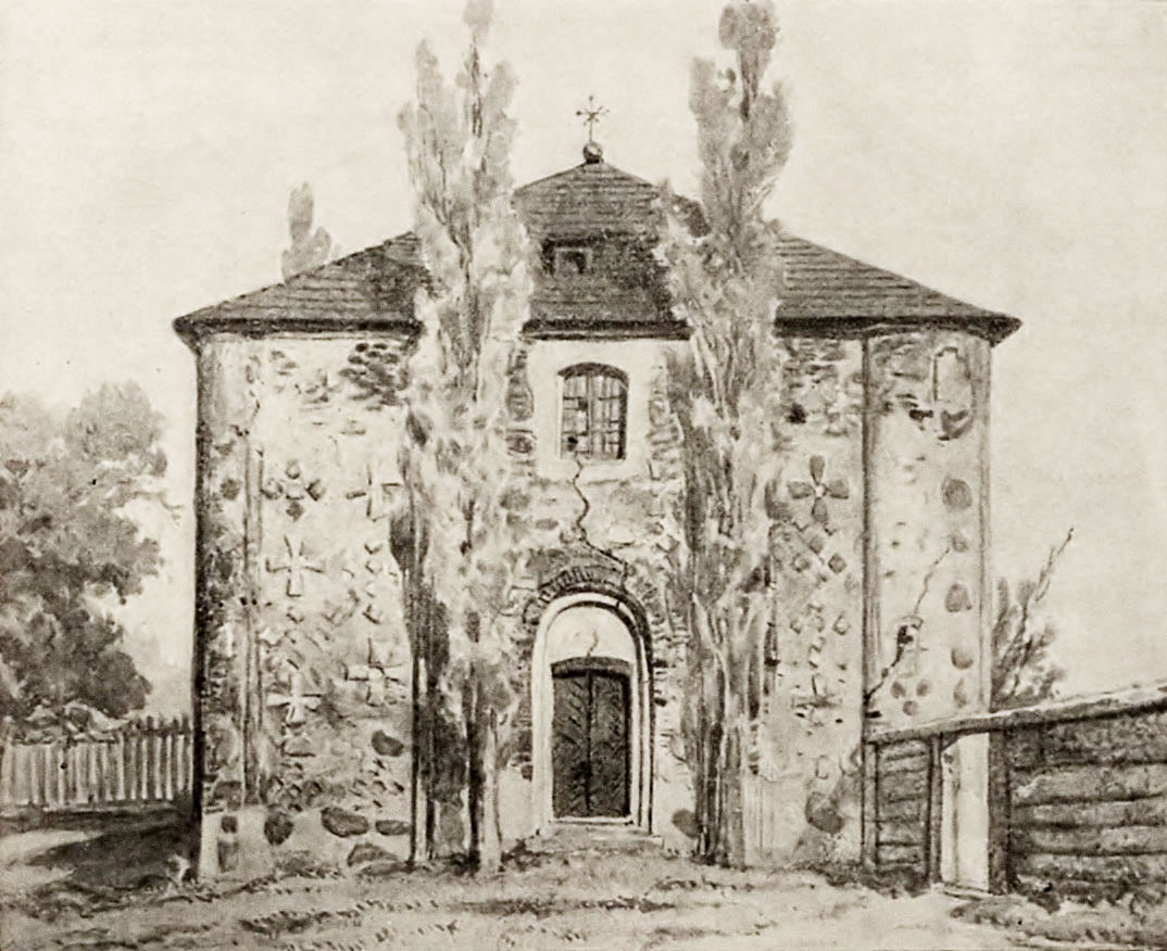 Беларуская (тарашкевіца): Горадня (Horadnia), Калоская царква (Kałoža)